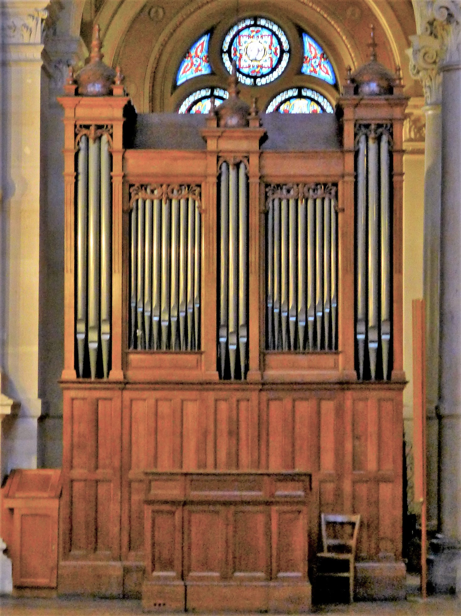 Église de la Sainte-Trinité de Paris (orgue de choeur) - Paris IX